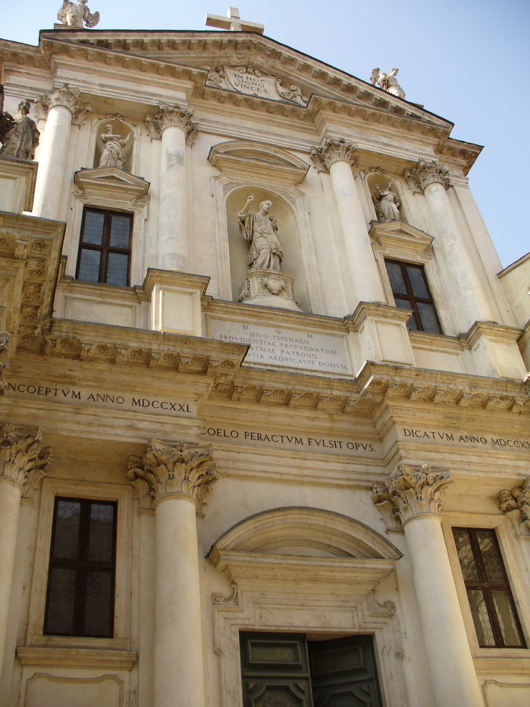 Vicenza - facade of San Gaetano